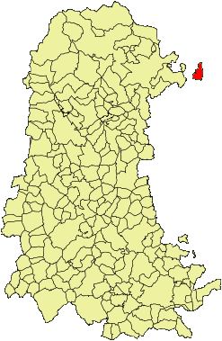 Municipio de Berzosilla respecto a la provincia de Palencia (España)